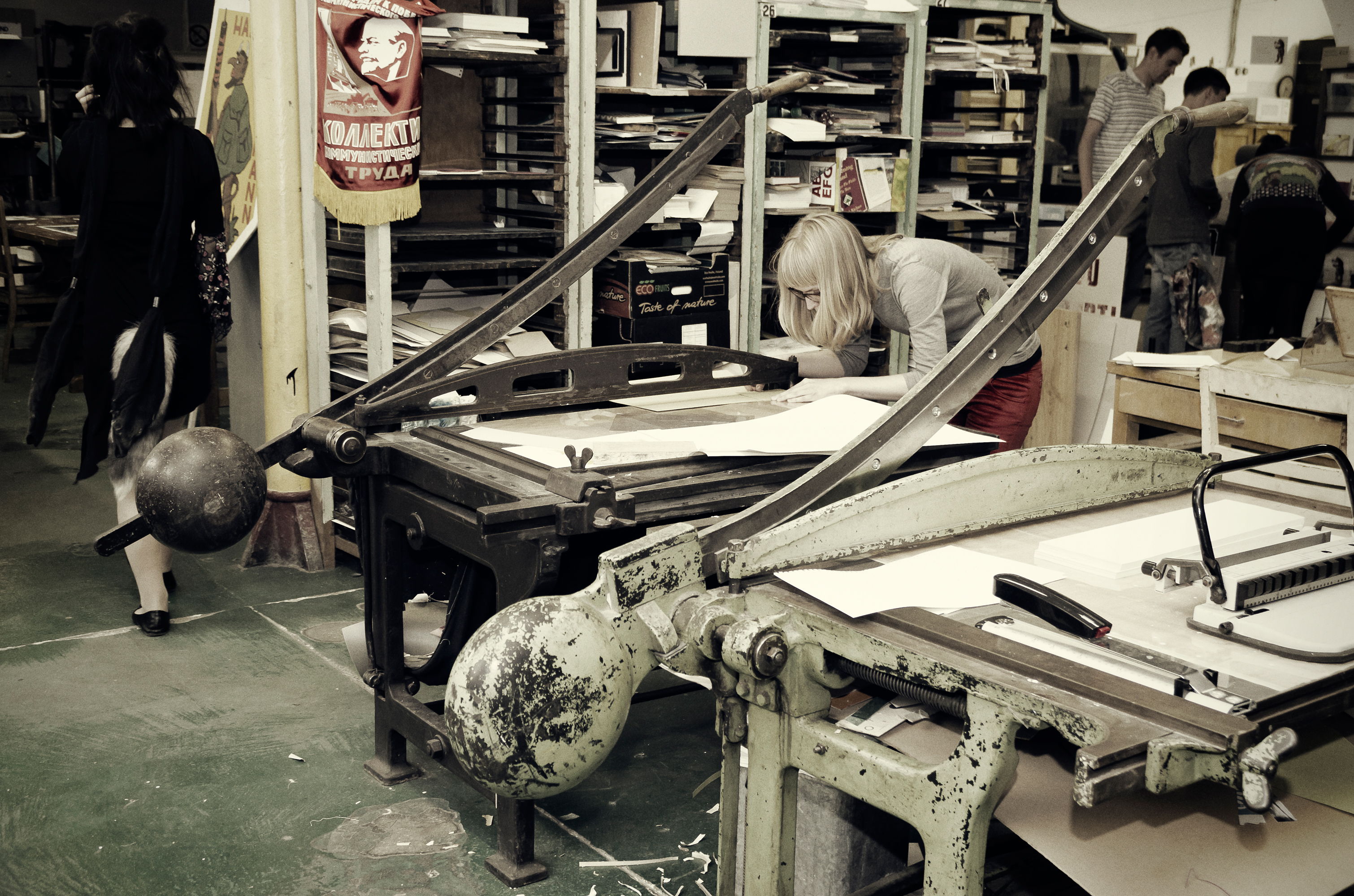 Töö Eesti Trükimuuseumis. Toimub Avatud Stuudio.